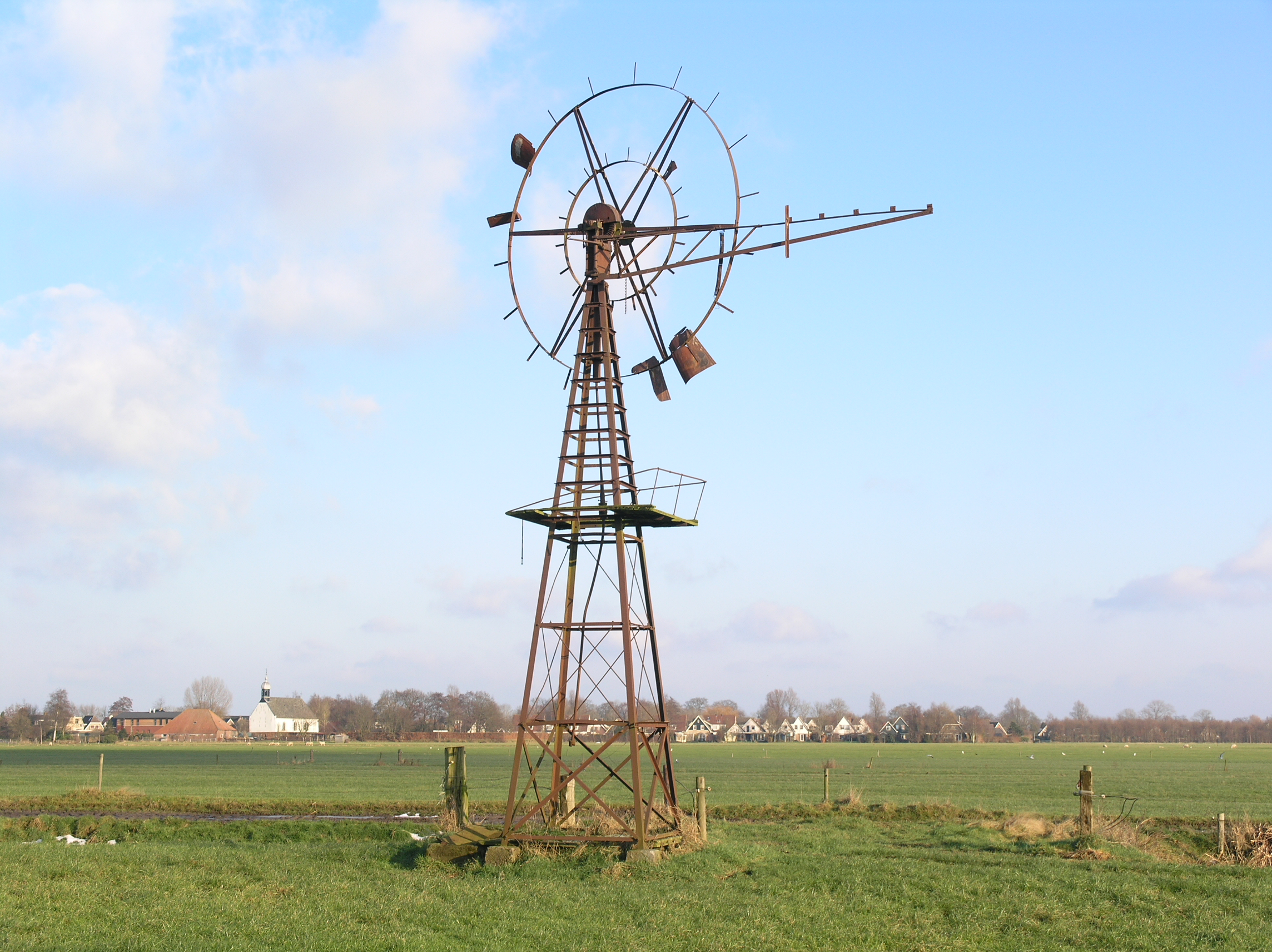 De Knipe Windmotor